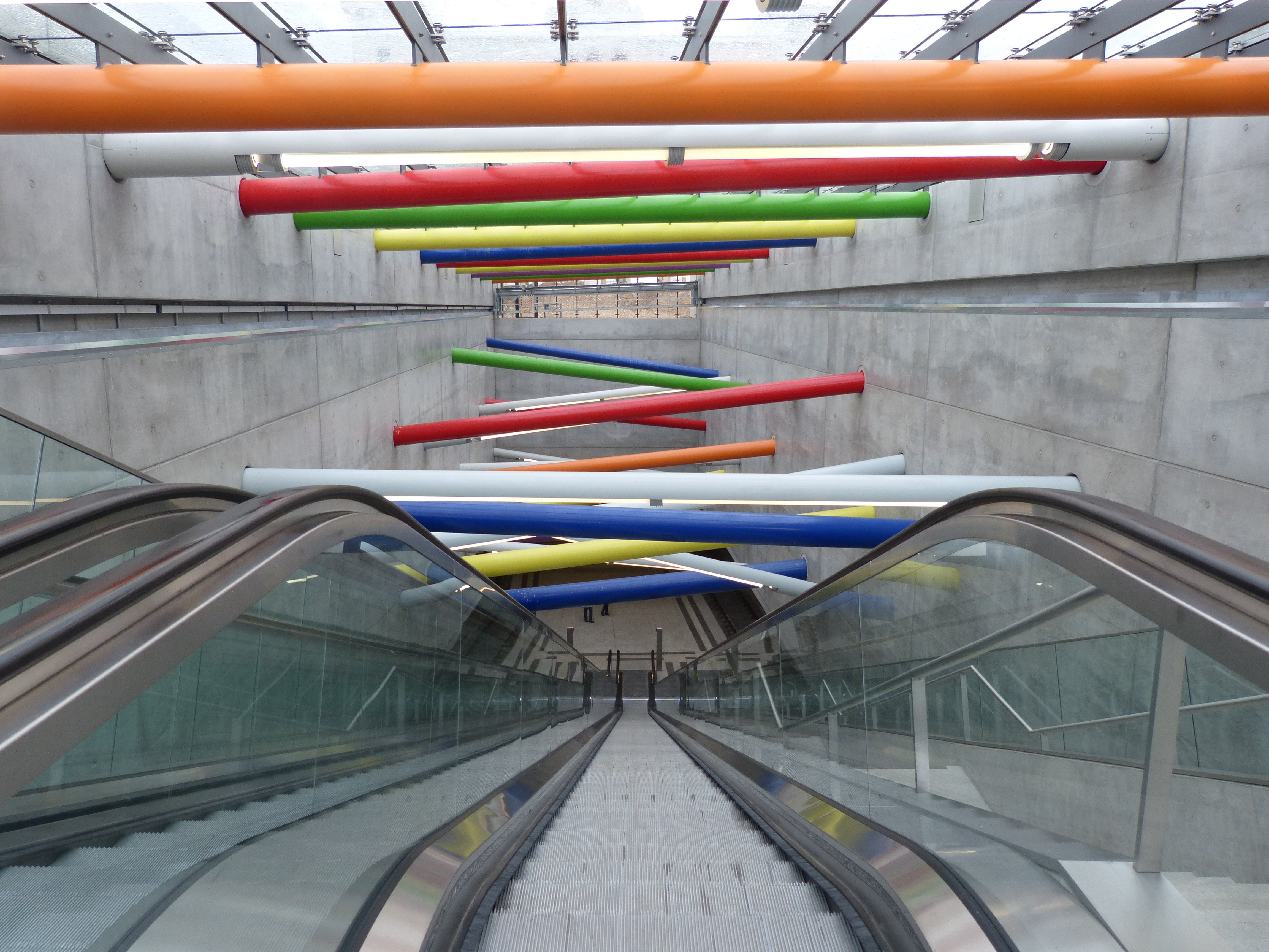 Bayerischer Bahnhof im Jahr 2014